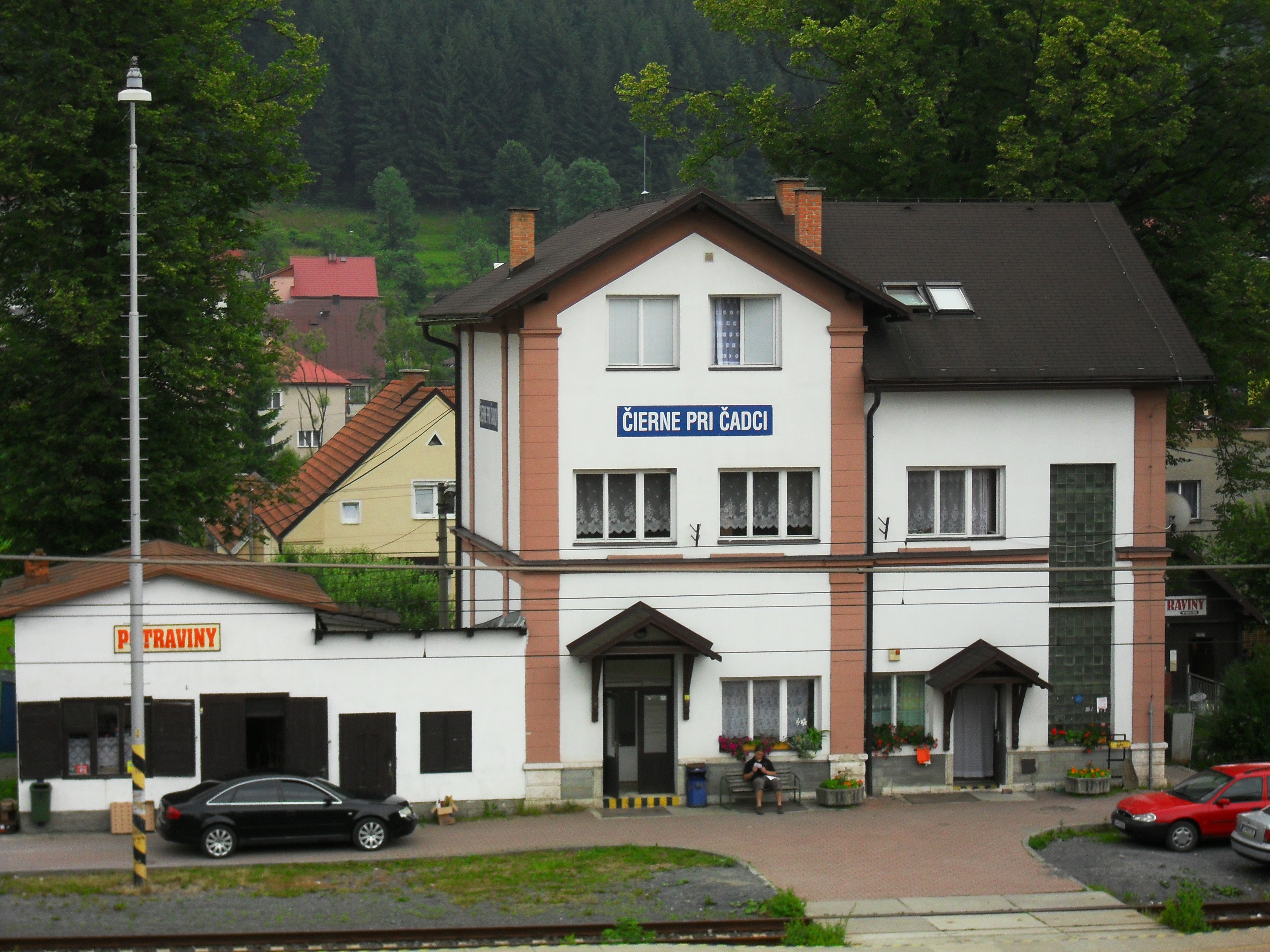 Dworzec kolejowy w Čiernej